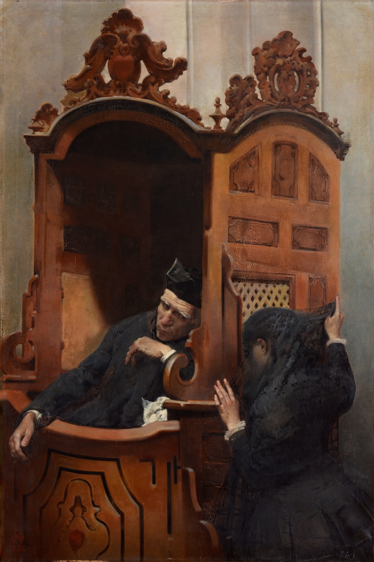 La obra representa a una mujer confesándose con un sacerdote católico.